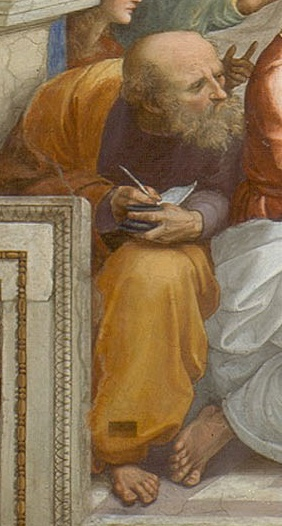 Anaximander, Detailansicht aus "Die Schule von Athen", Raphael Santi, 1510/11, Stanzen des Vatikans, Rom.